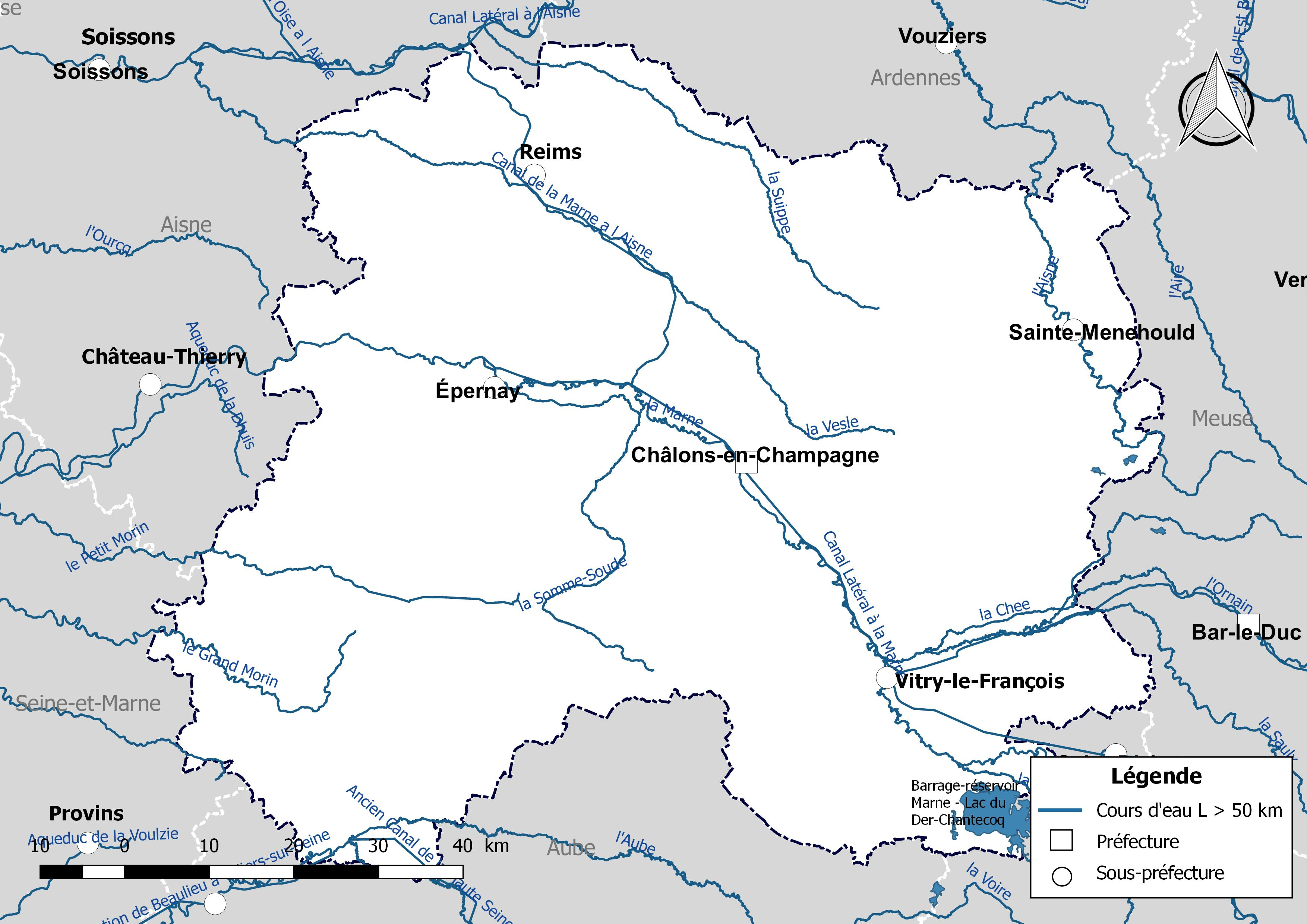 Carte des cours d'eau de longueur supérieure à 50 km drainant le département de la Marne (France).